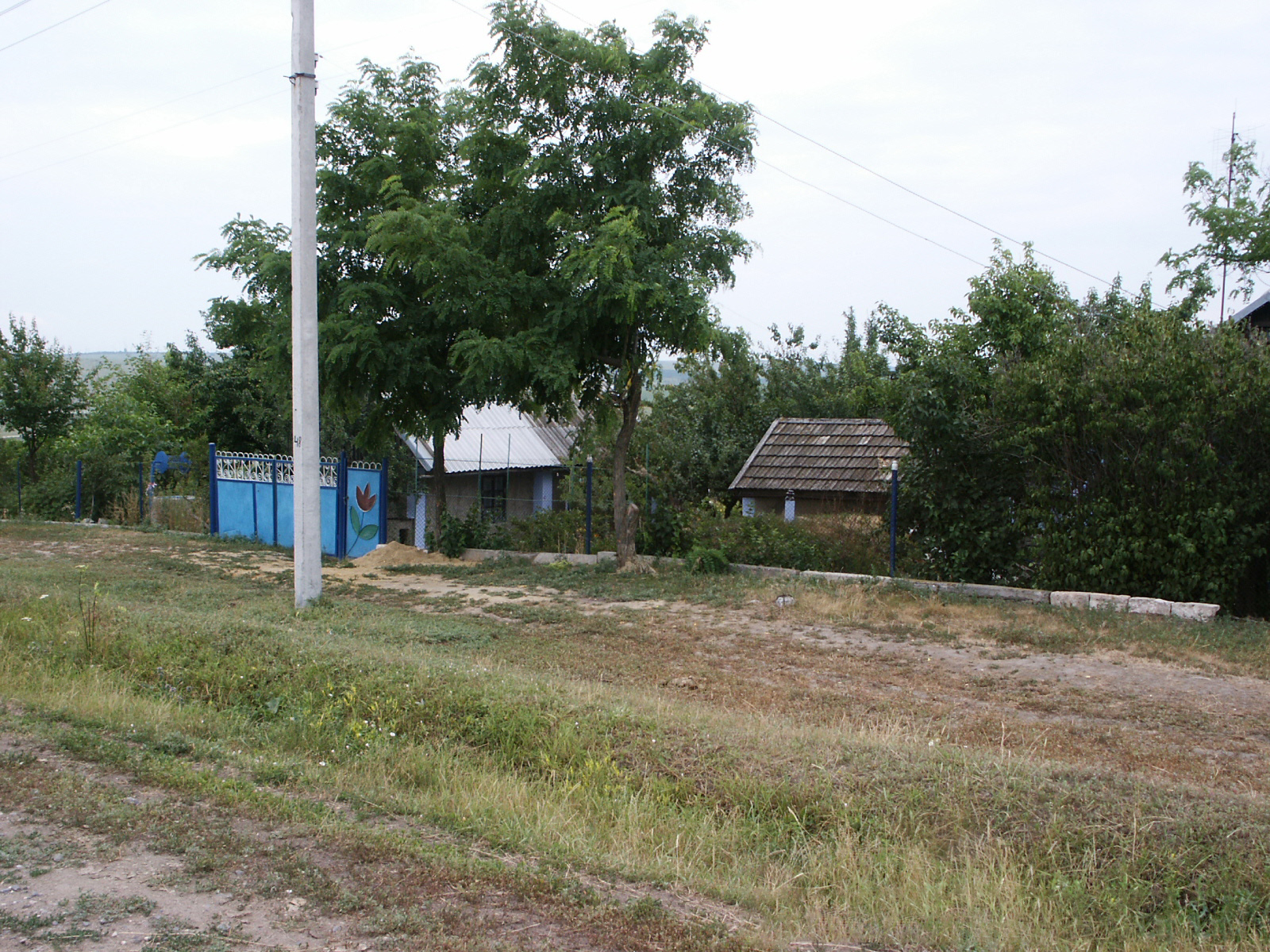 Средняя улица